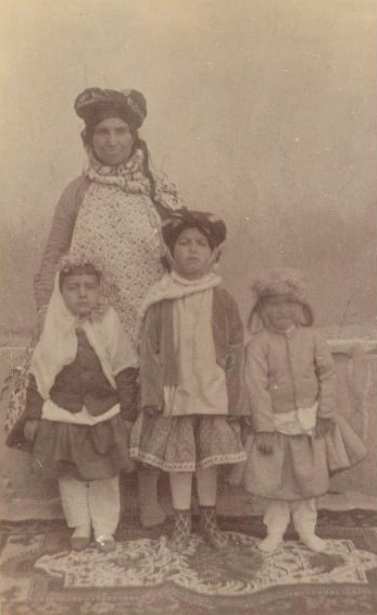 Famille kurde fin du 19e siècle.